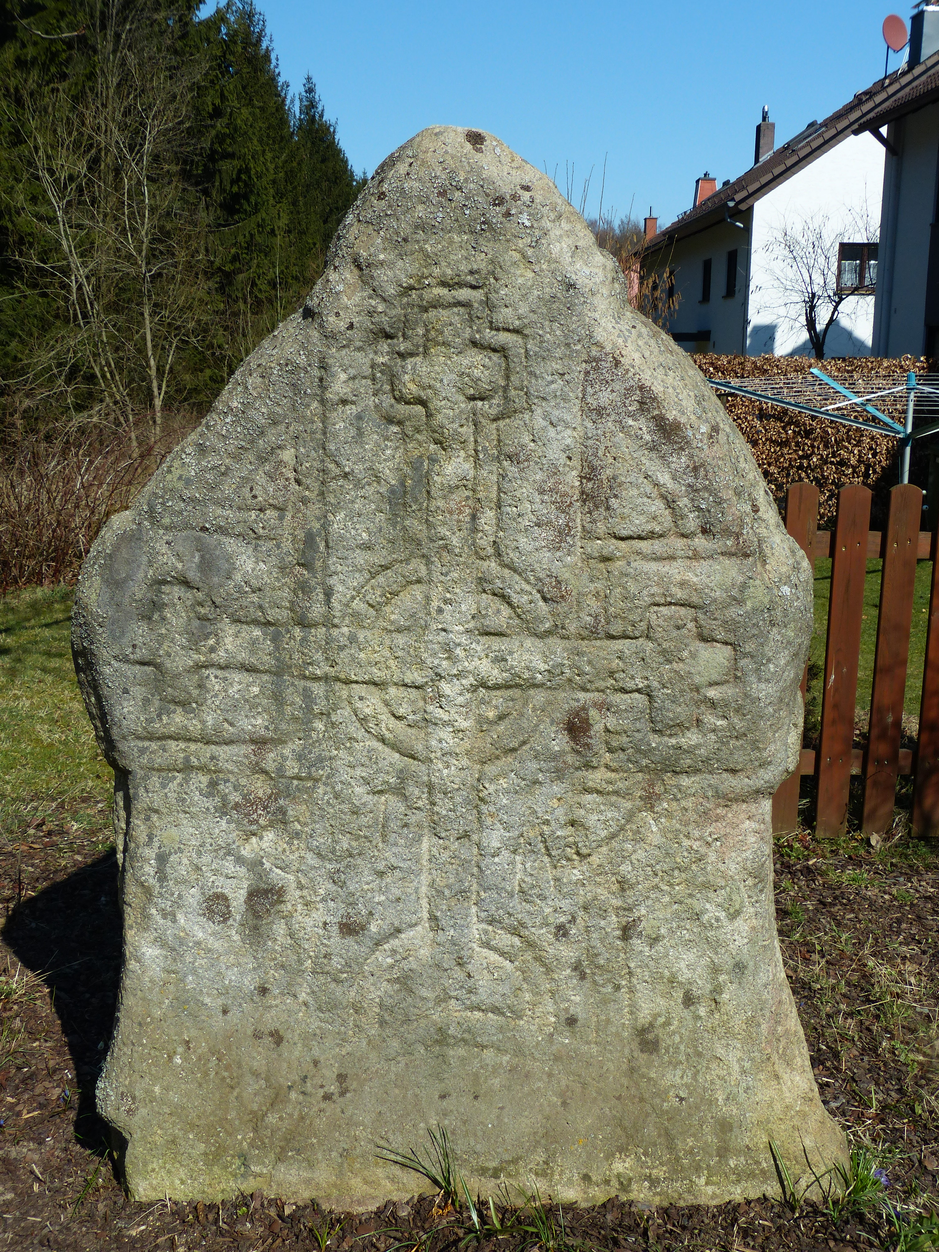 Bauwerke und Baudenkmäler von Schönwald